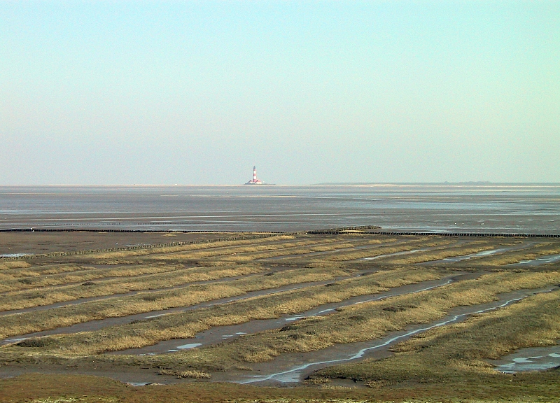 Landgewinnung an der Nordsee, Eiderstedt, Westerhever, Deutschland, Germany